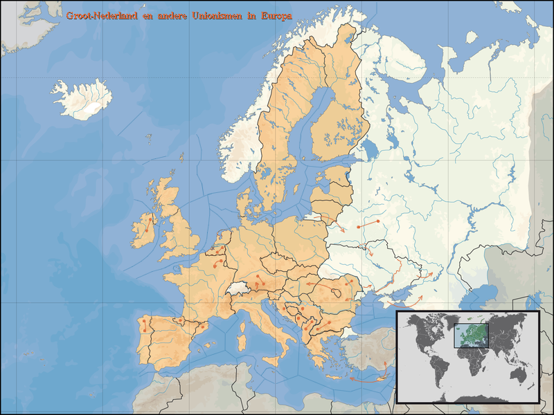 Carte néerlandaise des unionismes (points reliés) et séparatismes (flèches) en Europe.